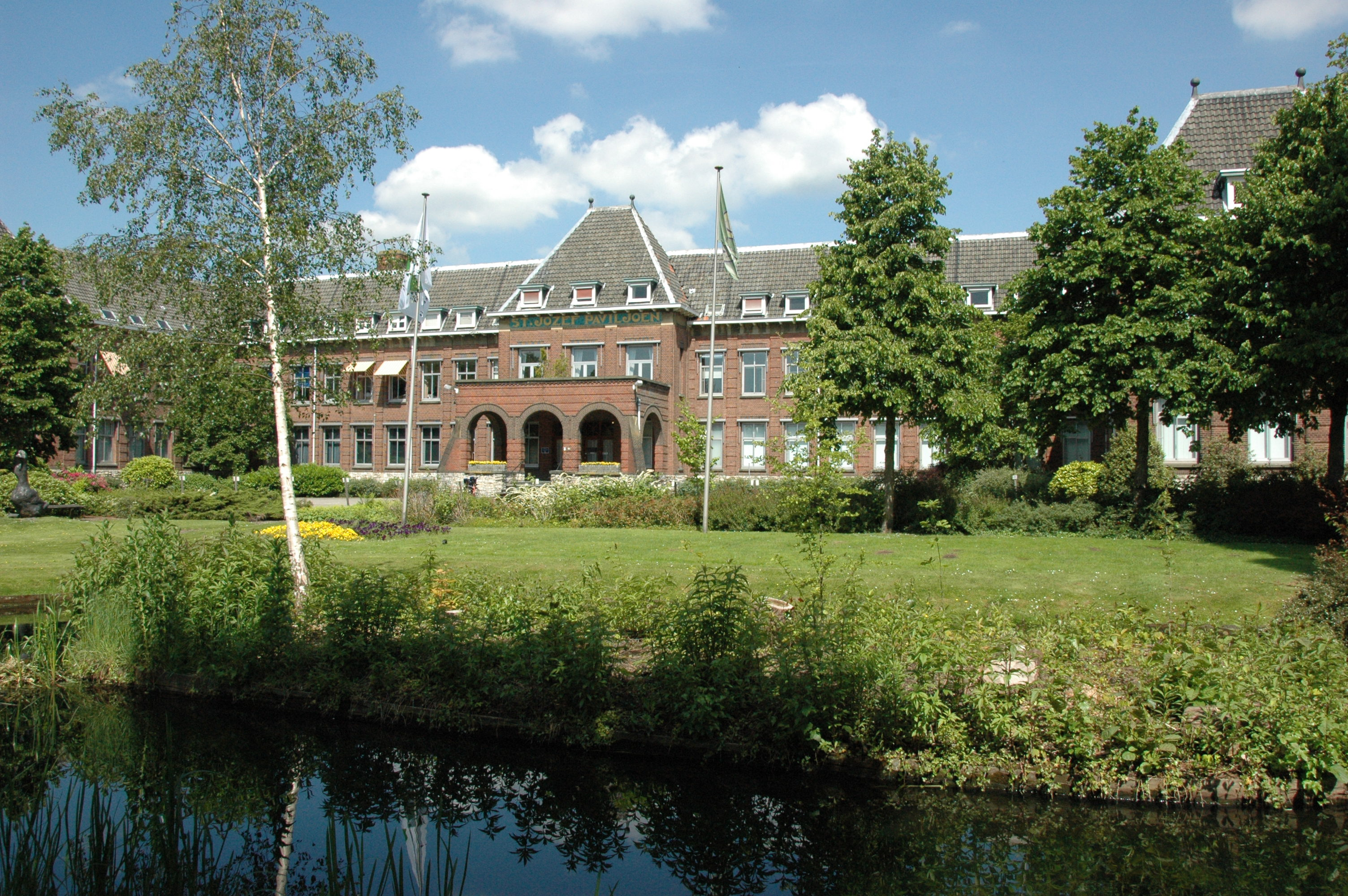 Jozef locatie Groene Hart Ziekenhuis, Graaf Florisweg in Gouda. Ziekenhuisfunctie tot begin 2014.